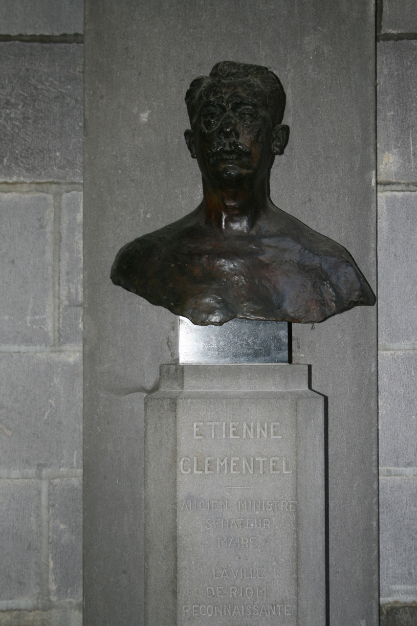 Statue d'Etienne Clementel à Riom.